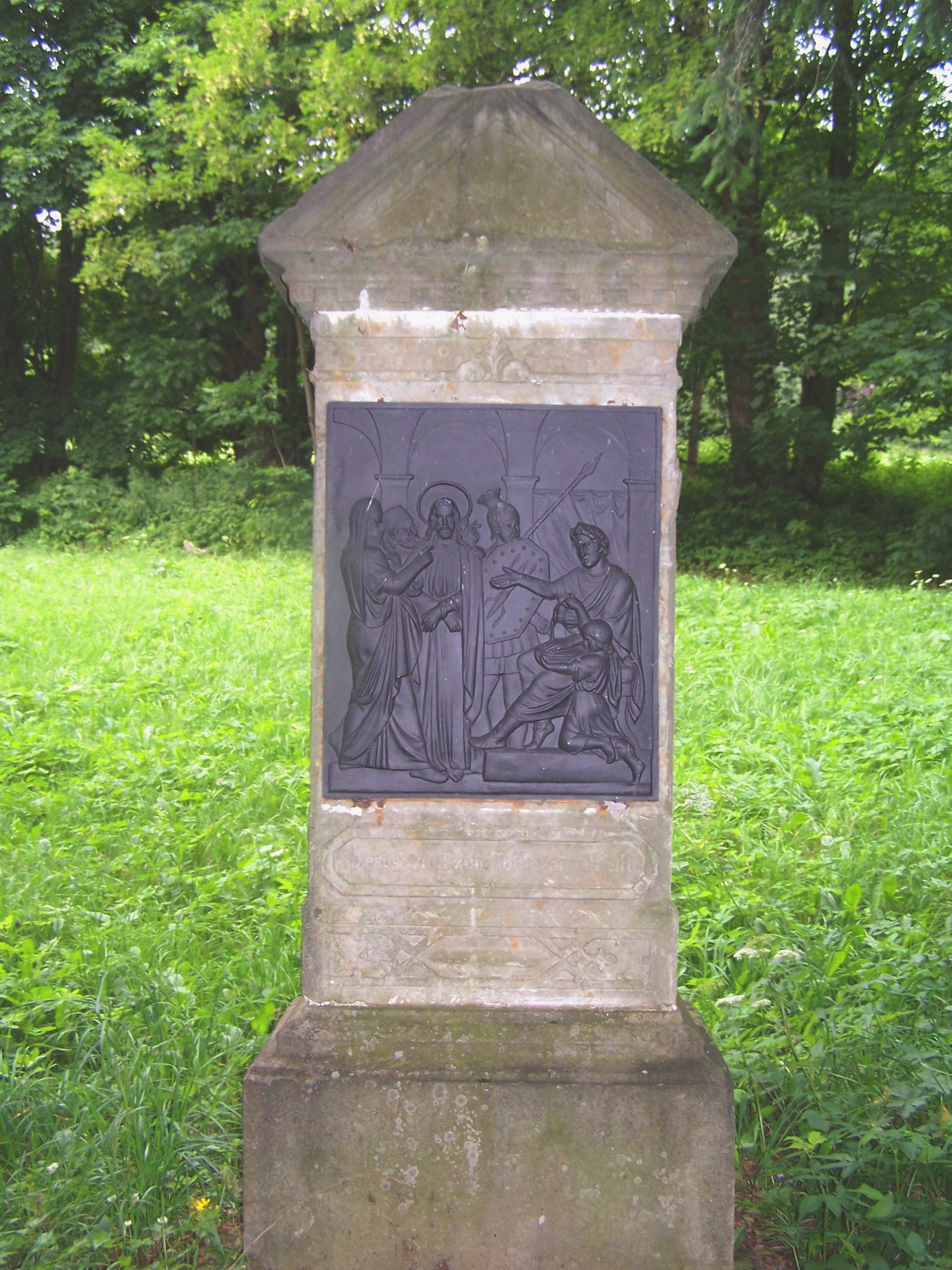 Křížová cesta v Deštném v Orlických horách - Zastavení první